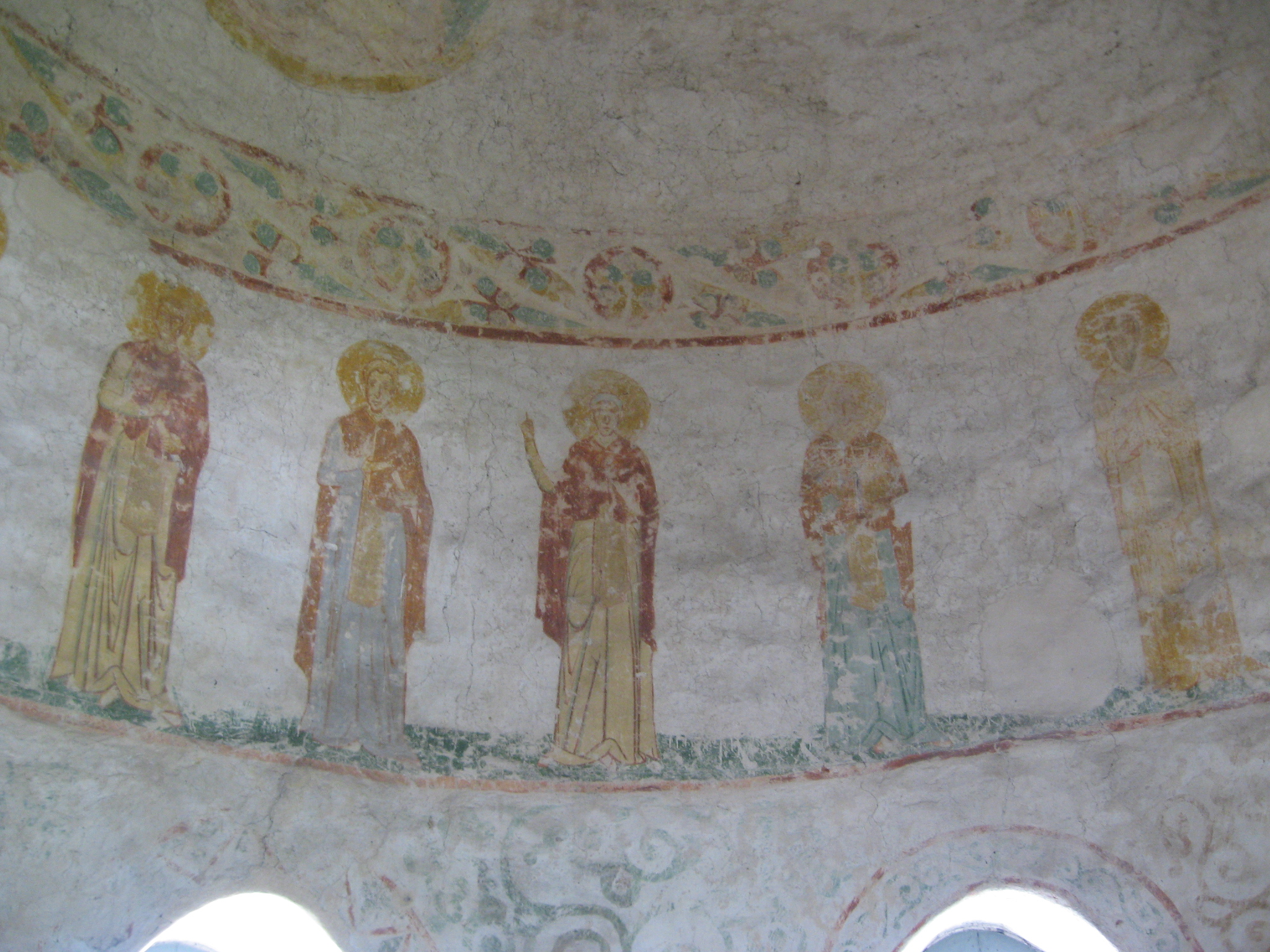 Фрески 12 века в приделе в куполе лестничной башни Георгиевского собора Юрьева монастыря.